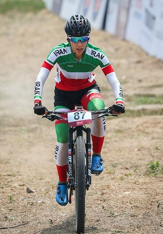 فرانک پرتوآذر در مسابقات دوچرخه‌سواری کوهستان - بازی‌های آسیایی ۲۰۱۸